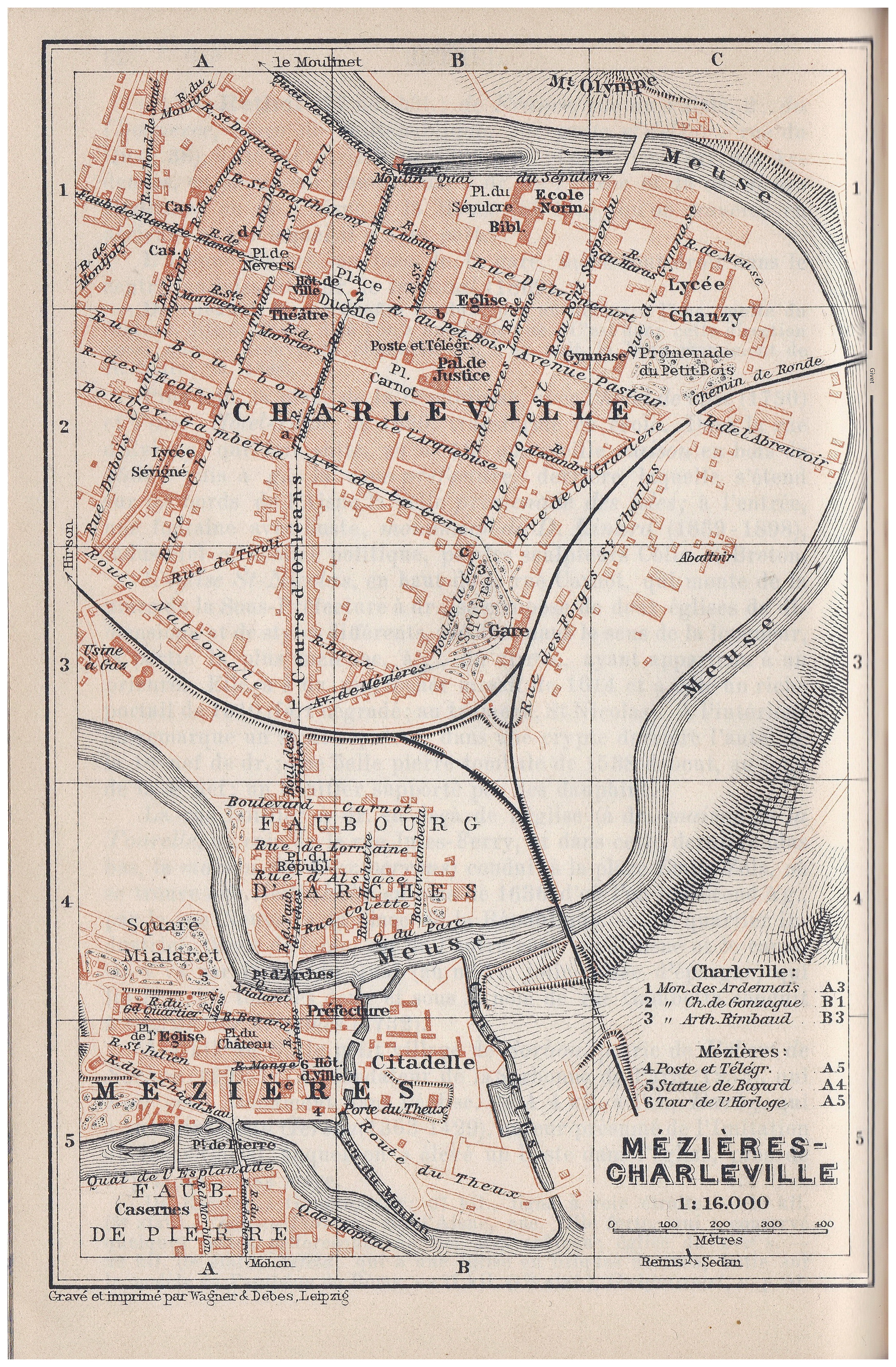 Charleville-Mézières (France, Dép.des Ardennes) — Plan du guide Baedeker de 1908. Mézières et Charlevilles, Villes autonomes jusqu'au 1er octobre 1966, fusionnent avec Montcy-Saint-Pierre, Mohon et Étion pour former l'entité Charleville-Mézières.